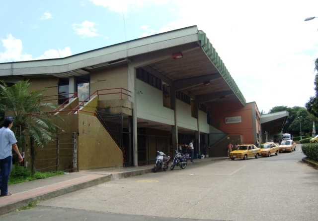 Zona de llegadas del Terminal de Transportes de Florencia, Caquetá, Colombia